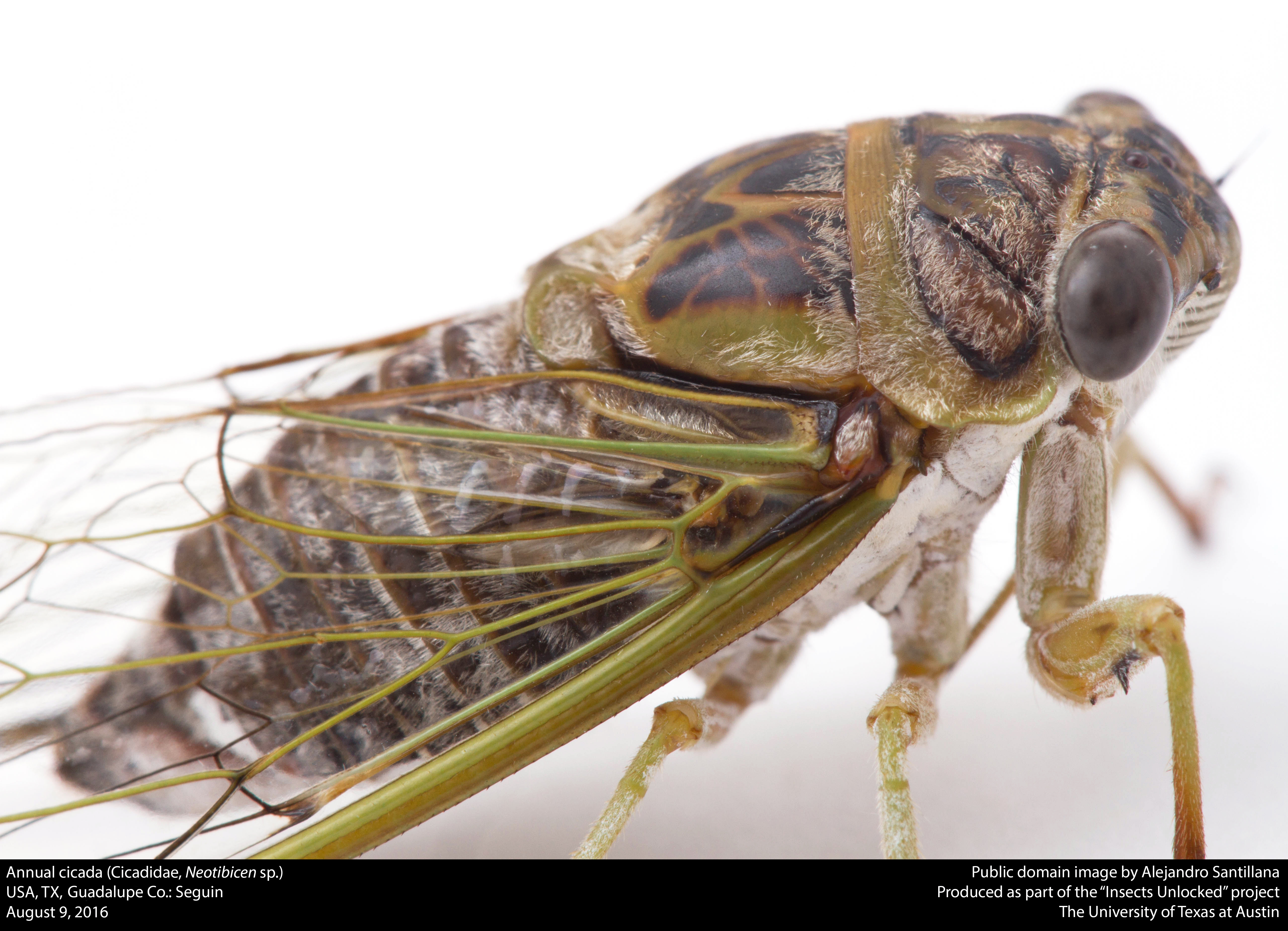 USA, TX, Guadalupe Co.: Seguin 9-viii-2016